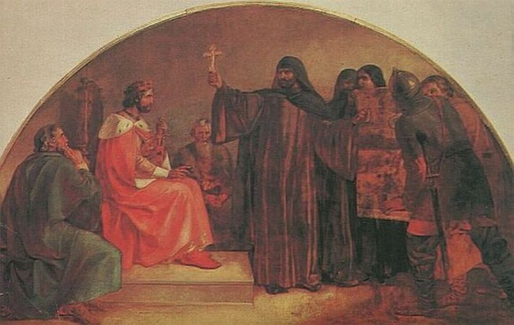 Выбор веры Великим Князем Владимиром. Святые сени Грановитой палаты Кремля. Завьялов Федор Семенович. 1847